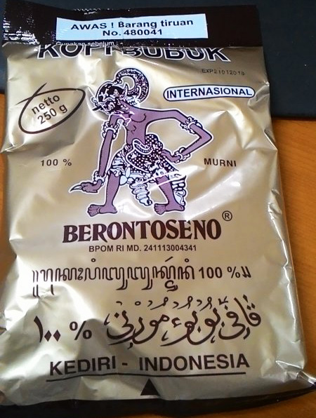 Kemasan kopi Berontoseno menggunakan aksara Jawa, Latin dan Arab. Jawa: ꦧꦸꦁꦏꦸꦱ꧀ꦏꦺꦴꦥꦺꦴꦧꦼꦫꦤ꧀ꦠꦱꦺꦤꦔꦁꦒꦺꦴꦲꦏ꧀ꦱꦫꦗꦮ꧈ꦭꦠꦶꦤ꧀ꦭꦤ꧀ꦔꦫꦧ꧀꧉